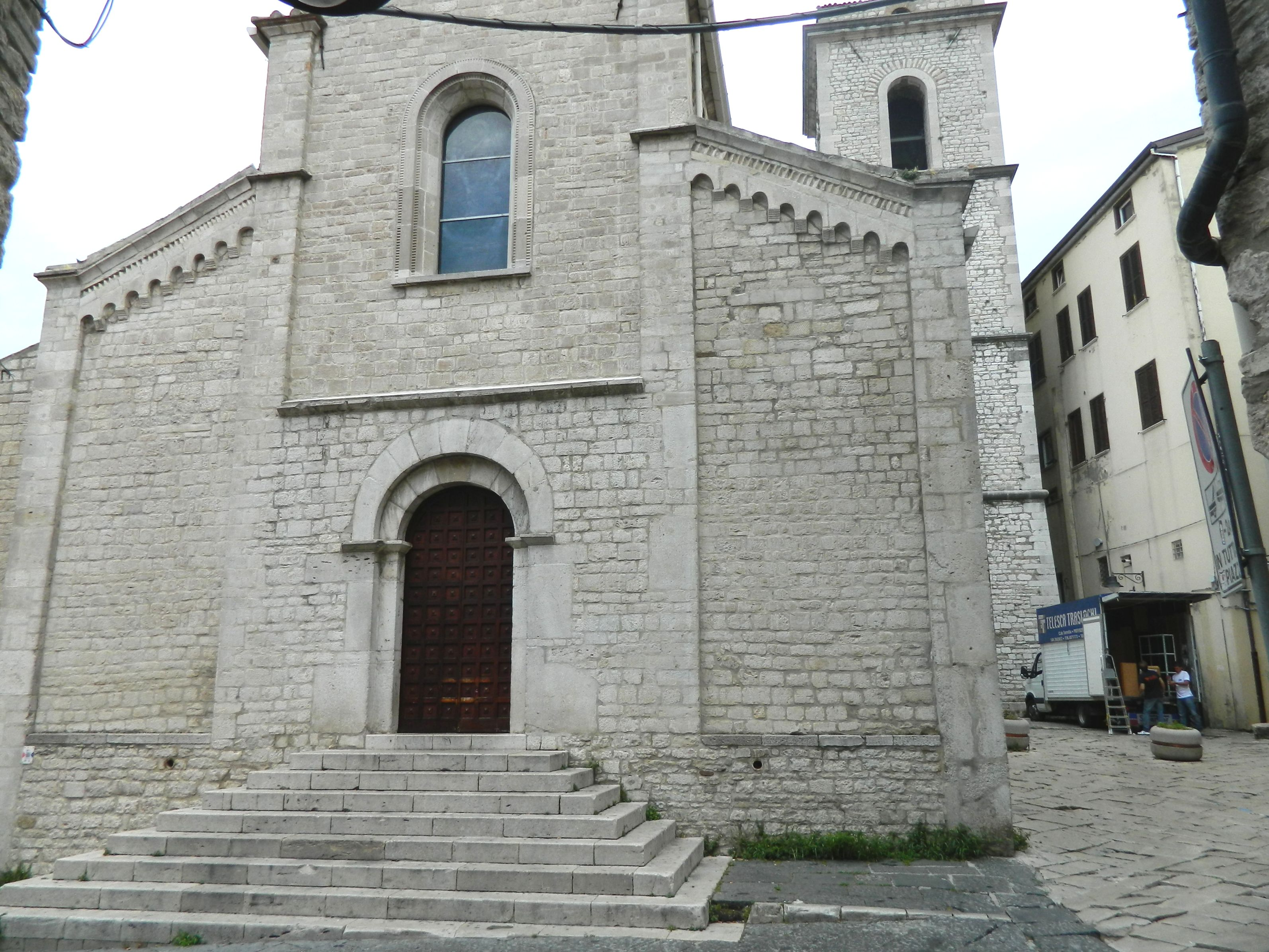 Chiesa di San Michele Arcangelo (Potenza) - Esterno